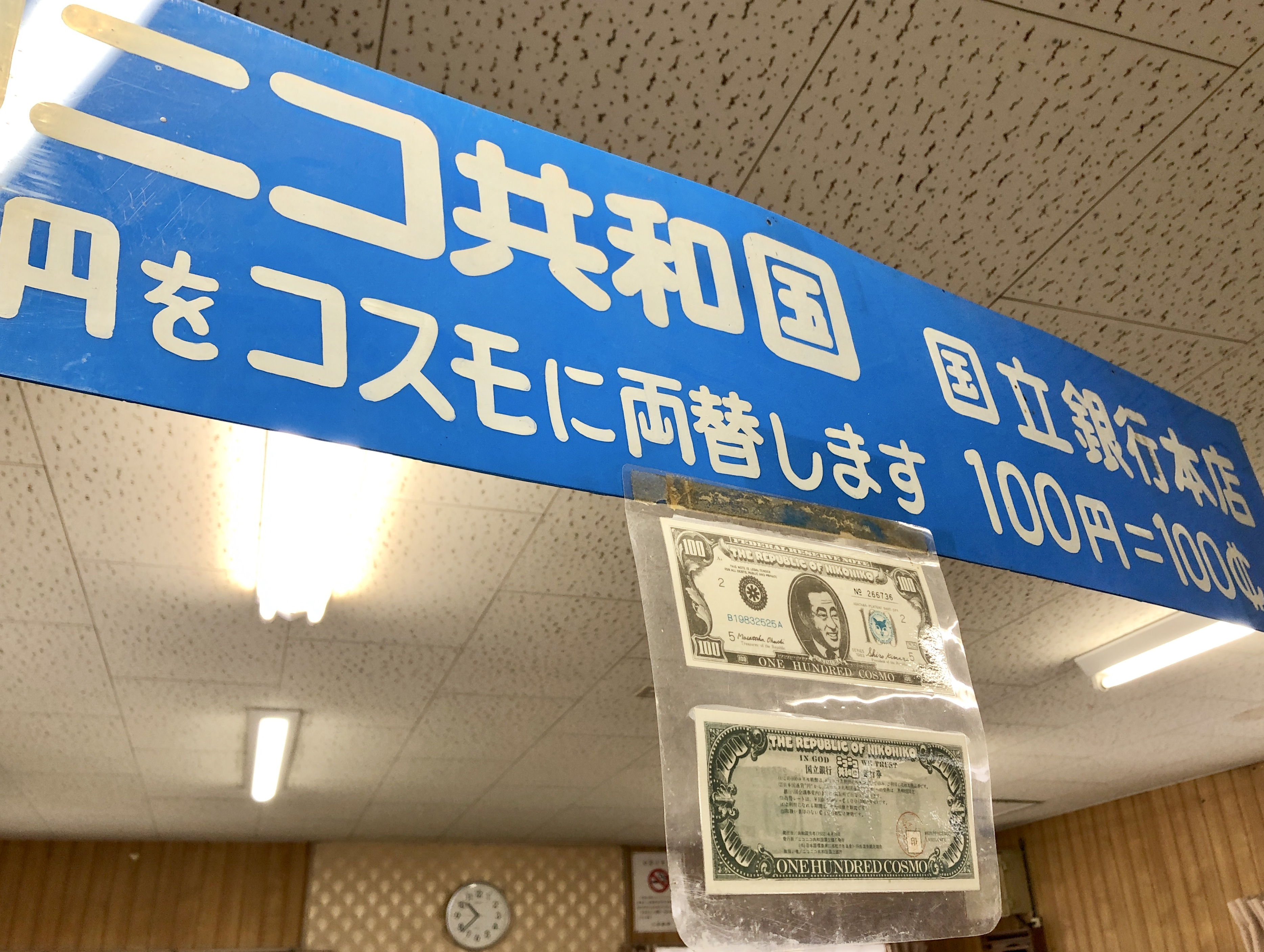 ニコニコ共和国に関する写真